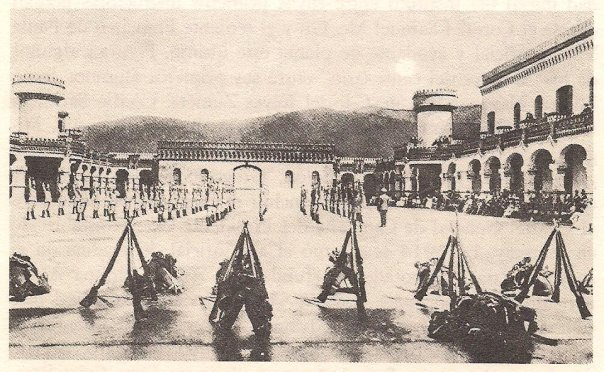 Foto de la Escuela Militar de Caracas a comienzos del siglo XX